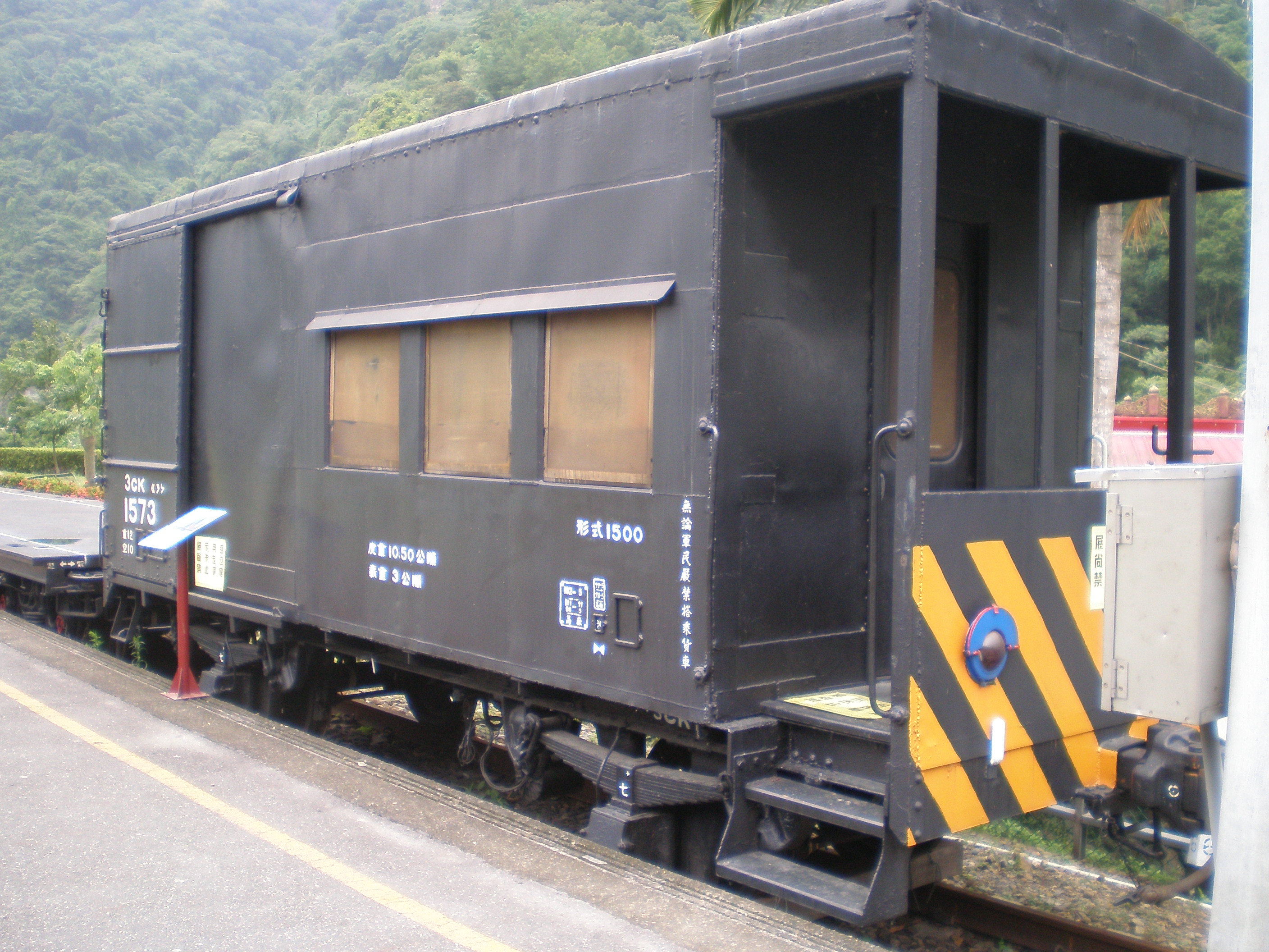 臺灣鐵路管理局守車3CK1573。